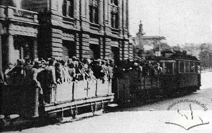 львівський трамвай, у причепних вагонах до якого перевозять в*знів Янівського концтабору. Адольф Гітлер Штрассе (сучасний проспект Свободи). Будівля на задньому плані - Львівська опера